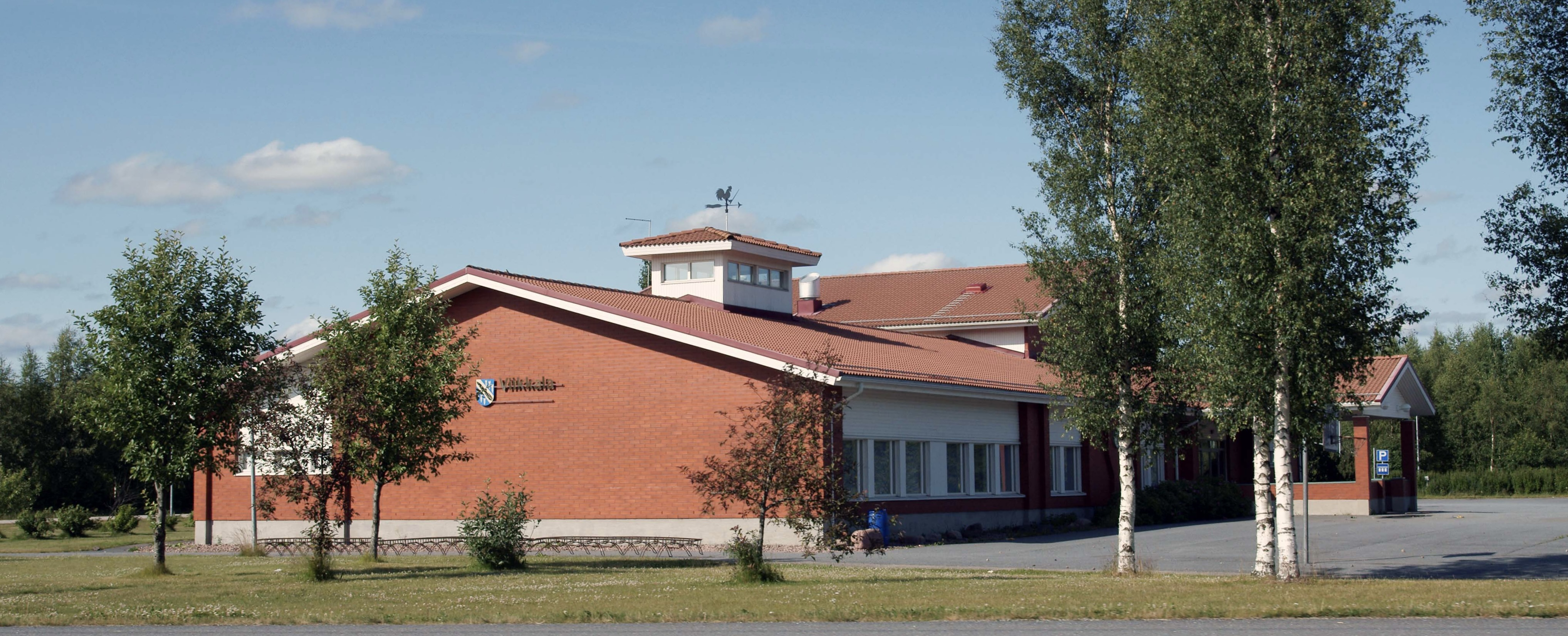 Viikkalan koulu, Nakkila.